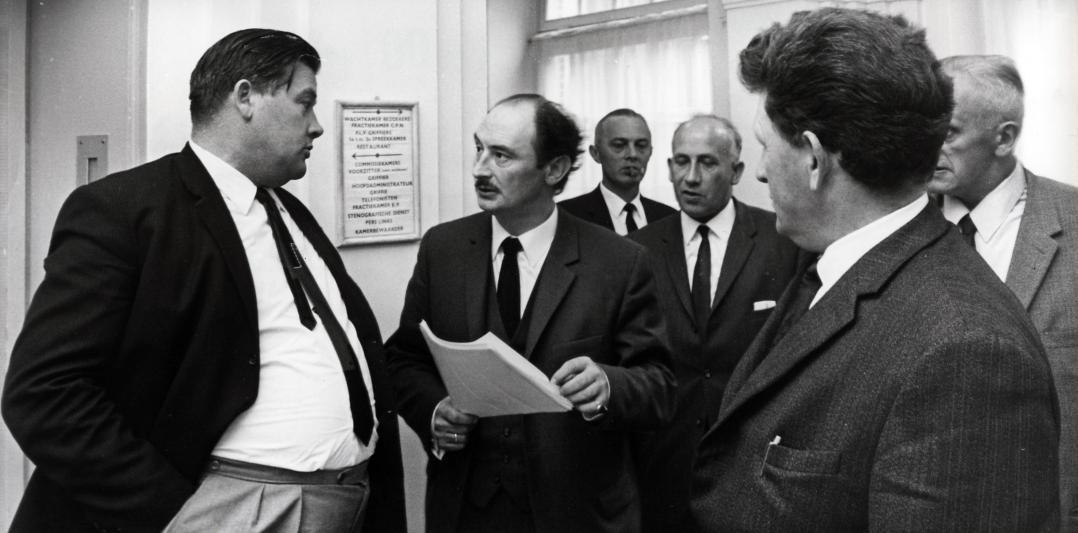 Viermans oppositie van de Boerenpartij die voor afsplitsing zorgde met een motie van wantrouwen tegen partijleider Koekoek. Met papier in de hand: H. Kronenburg. Den Haag, Nederland, 25 juni 1968.